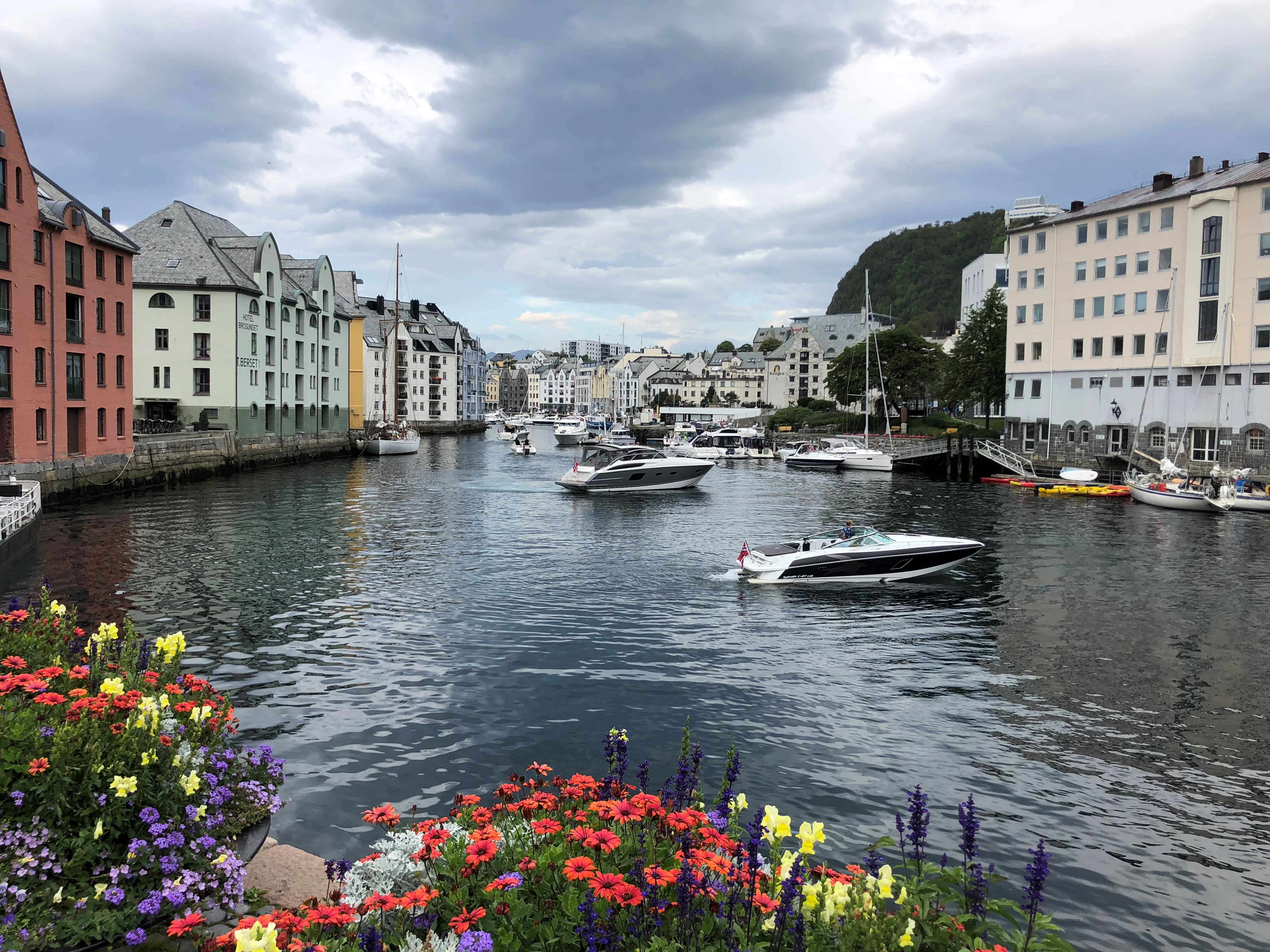 Indre havn - eller Brosundet som det heter - i Ålesund. Sjøbuene huser nå boliger, kontorer og hoteller.Bildet er tatt i 2018.